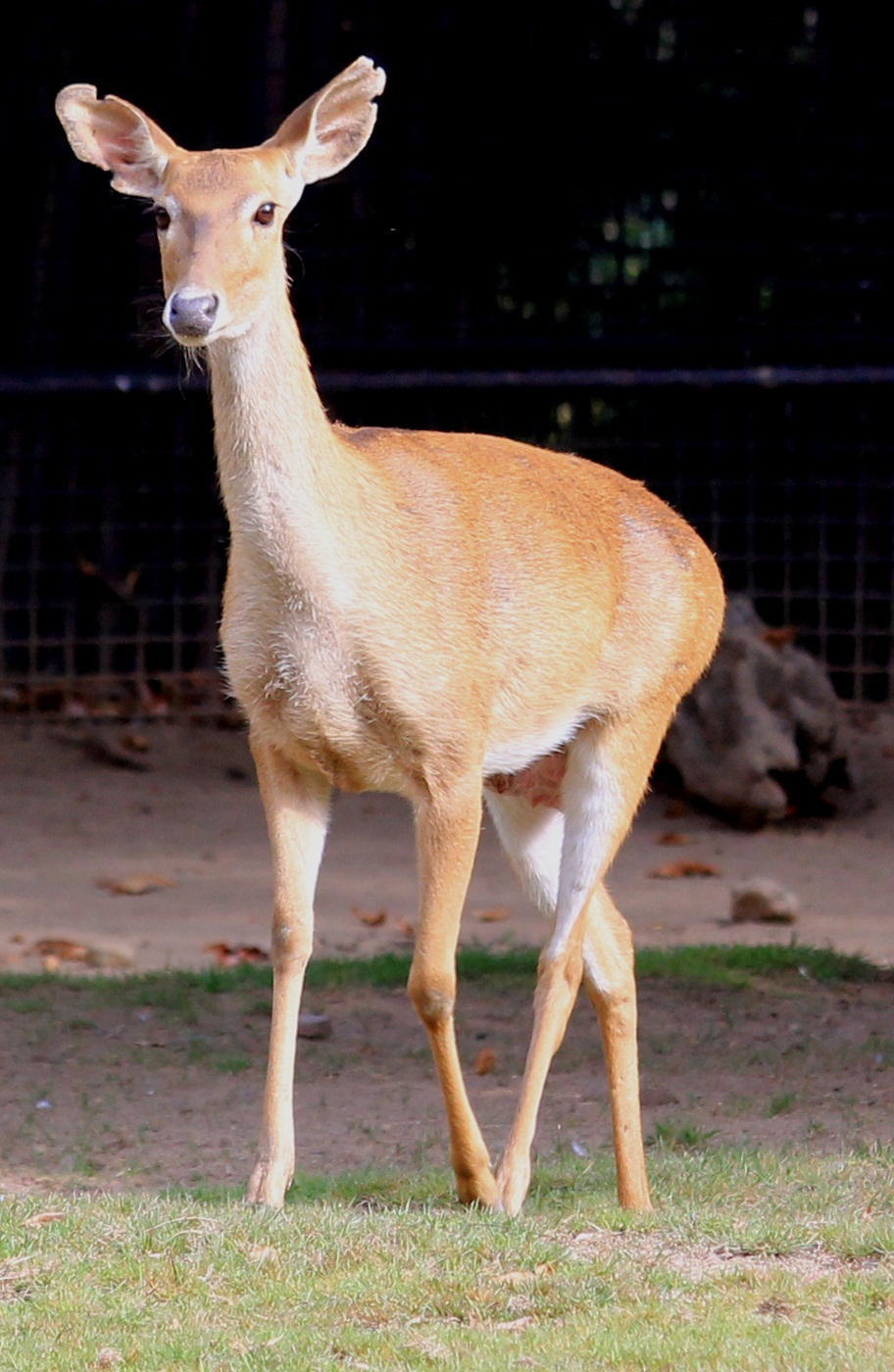 Tải lại từ WC, cắt hình để lấy hình chân dung.